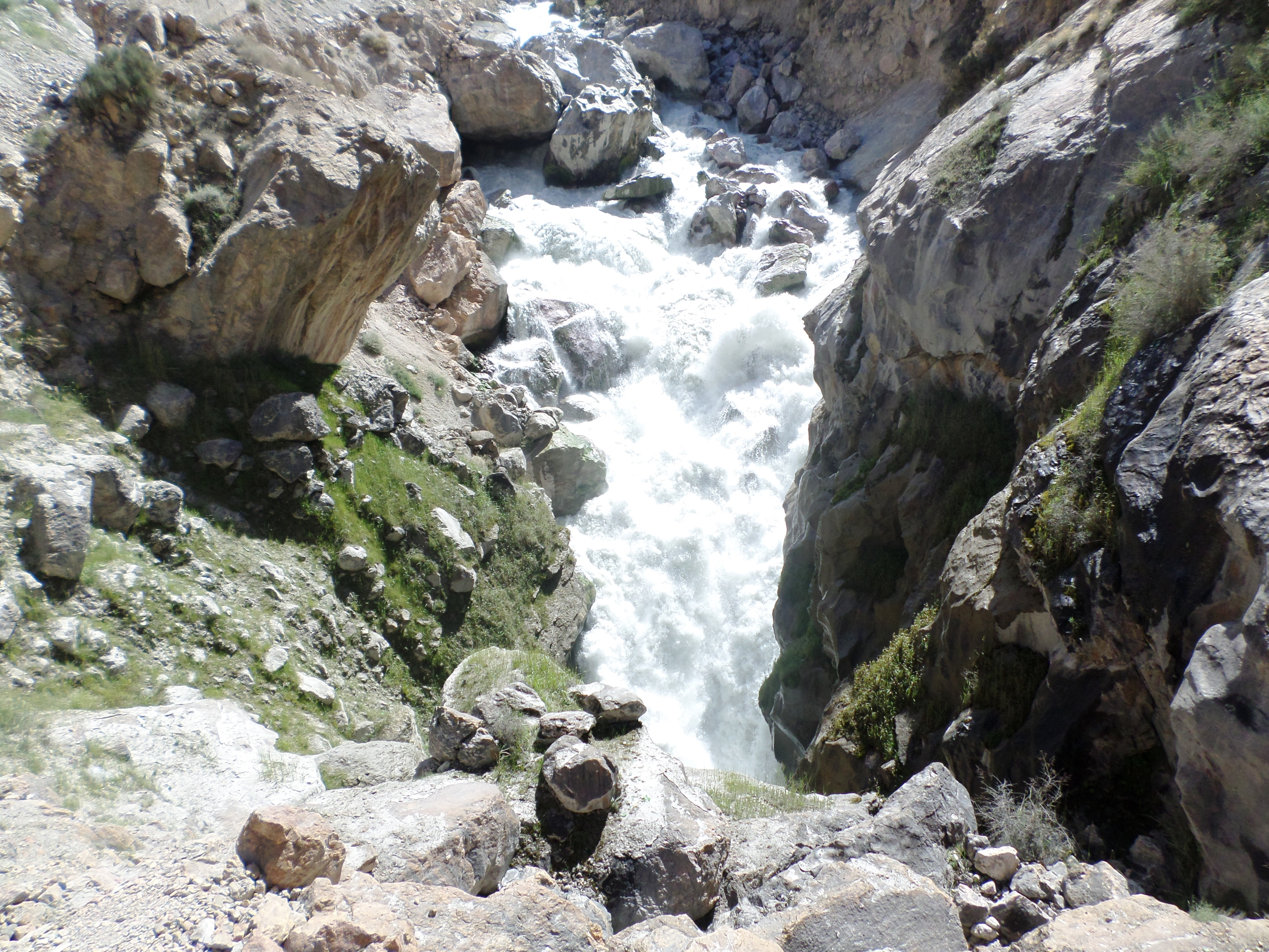 Фондаря, вход в скалу в Согдийской области Таджикистана Тоҷикӣ: Фондарё (вуруд ба мағзи кӯҳ) роҳи Душанбе-Хуҷанд дар вилояти Суғд